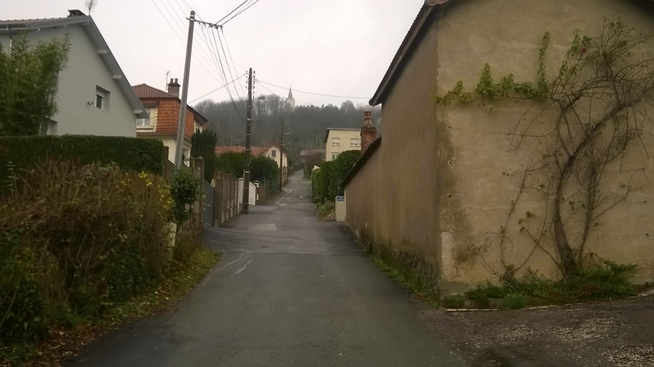 La rue Vendémiaire à Vesoul